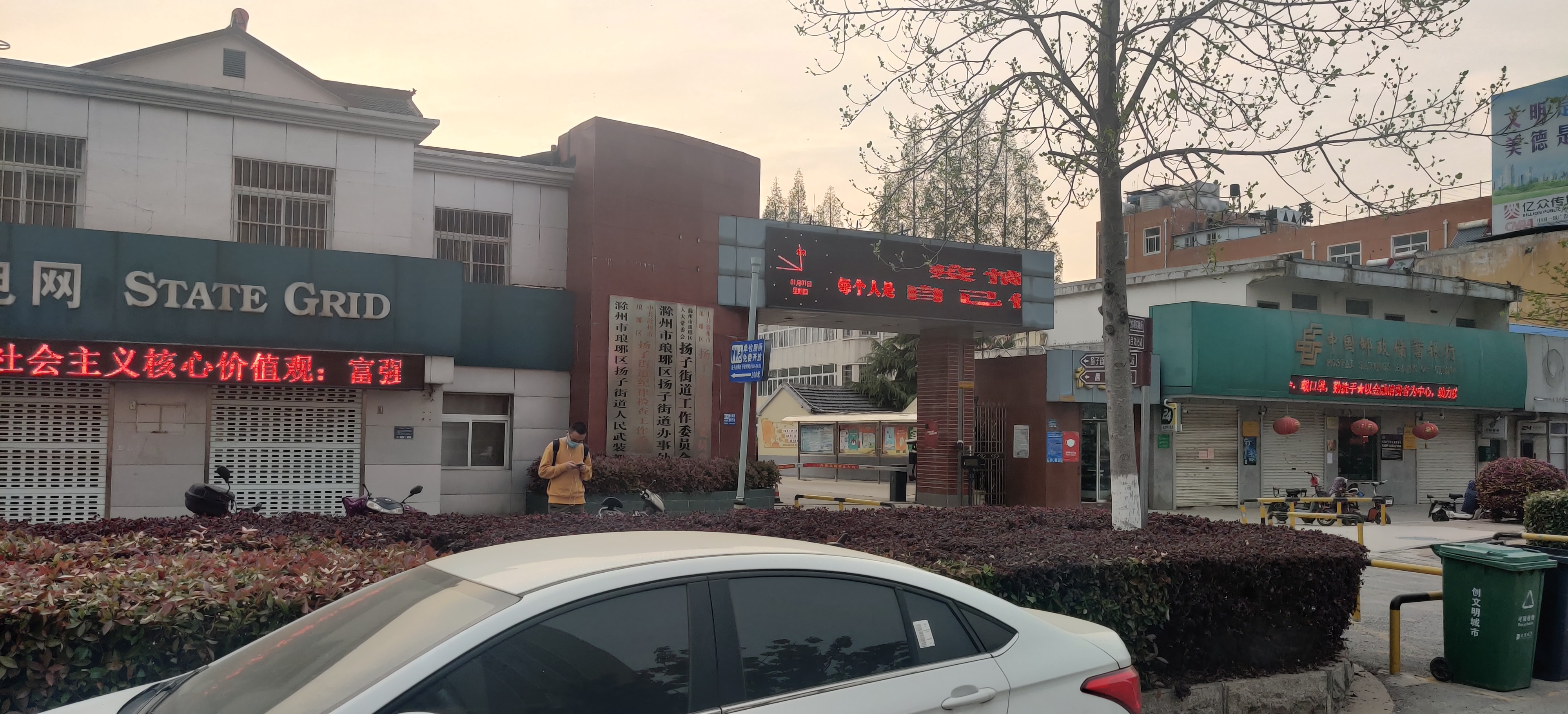 中文（中国大陆）: 扬子街道办事处